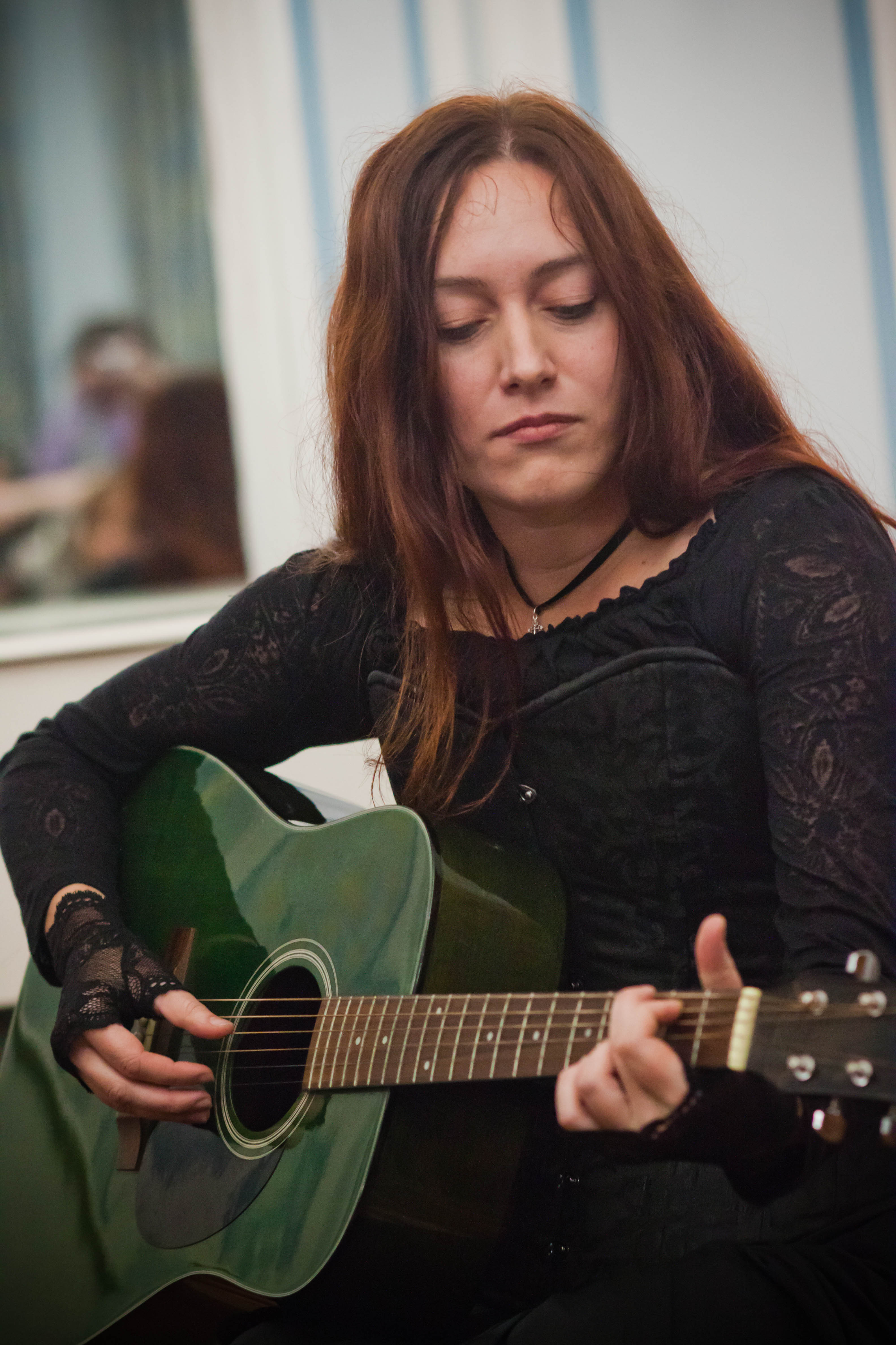 Музыкант и музыкотерапевт Алиса Апрелева в Библиотеке искусств имени А.П. Боголюбова (Москва) на презентации книги "Музыкант как волонтёр"